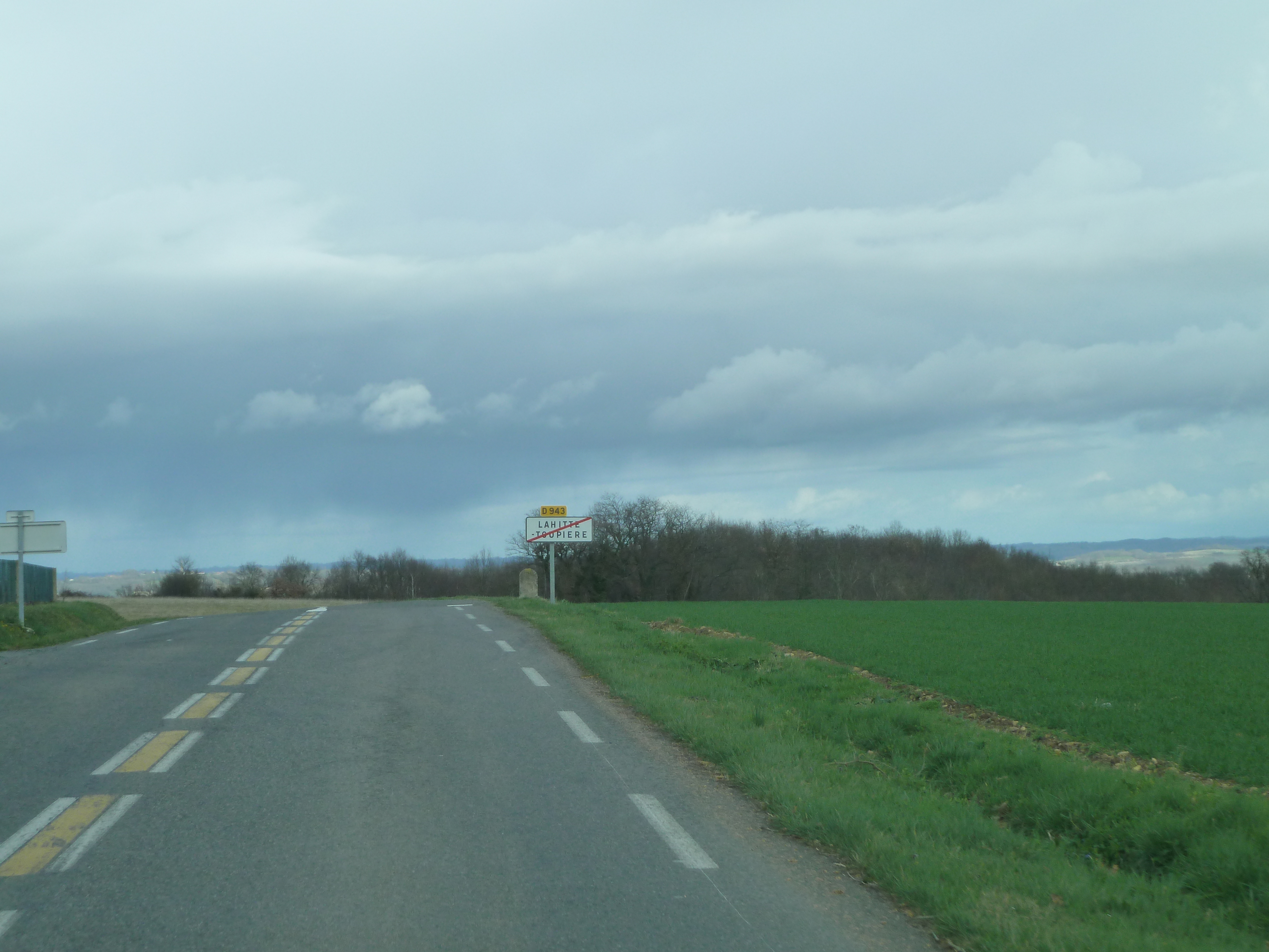 Sortie de Lahitte-Toupière